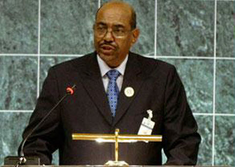 UN-Omer AL-bashir